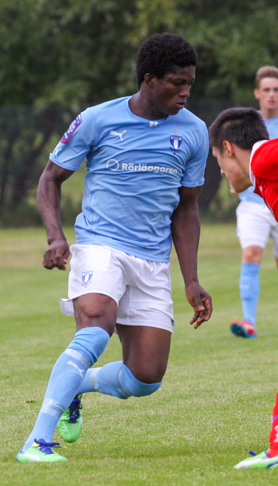 Benjamin Fadi i en U21-match mellan Malmö FF och Kalmar FF på Hyllie IP.